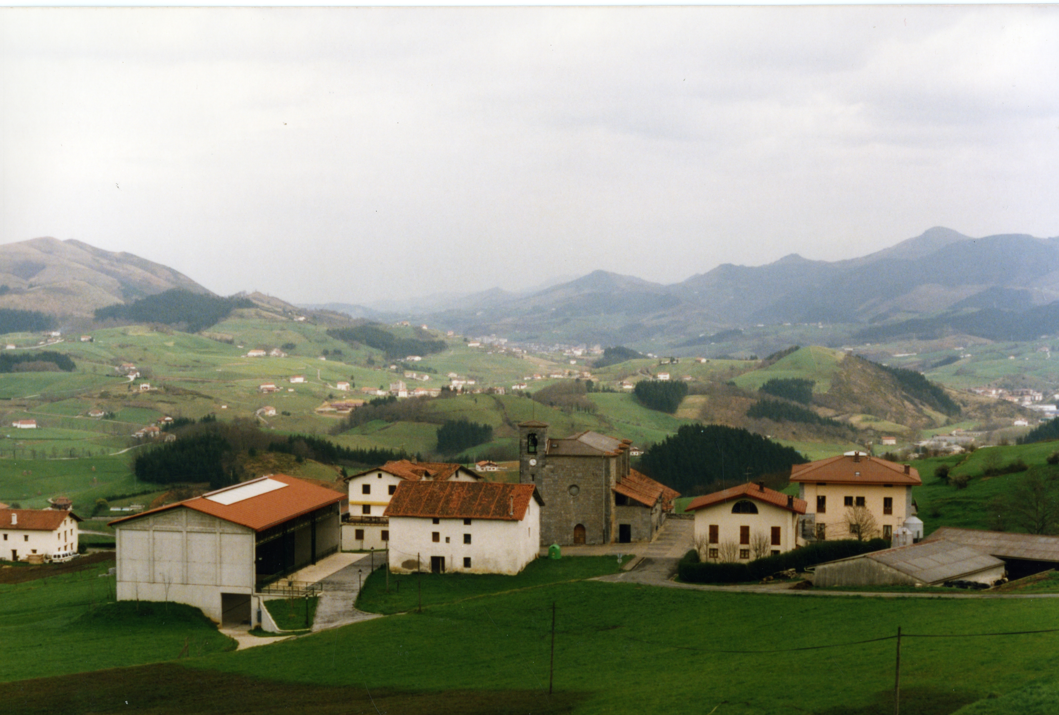 Aiurri 31 zbk. 3. orr.